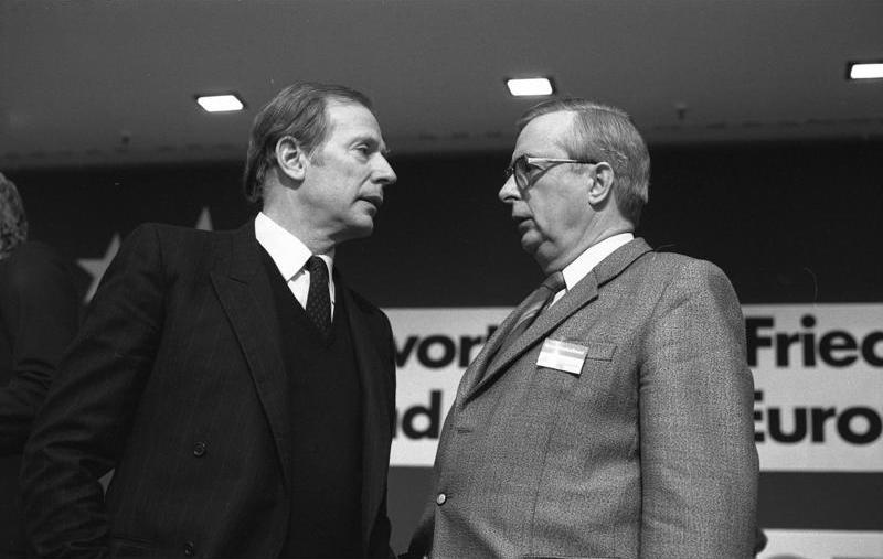 19.11.1983 SPD-Parteitag im Kölner Messezentrum Verabschiedung des Leitantrages des SPD-Vorstandes zur Sicherheitspolitik (zur Nachrüstung gemäß NATO-Doppelbeschluß).